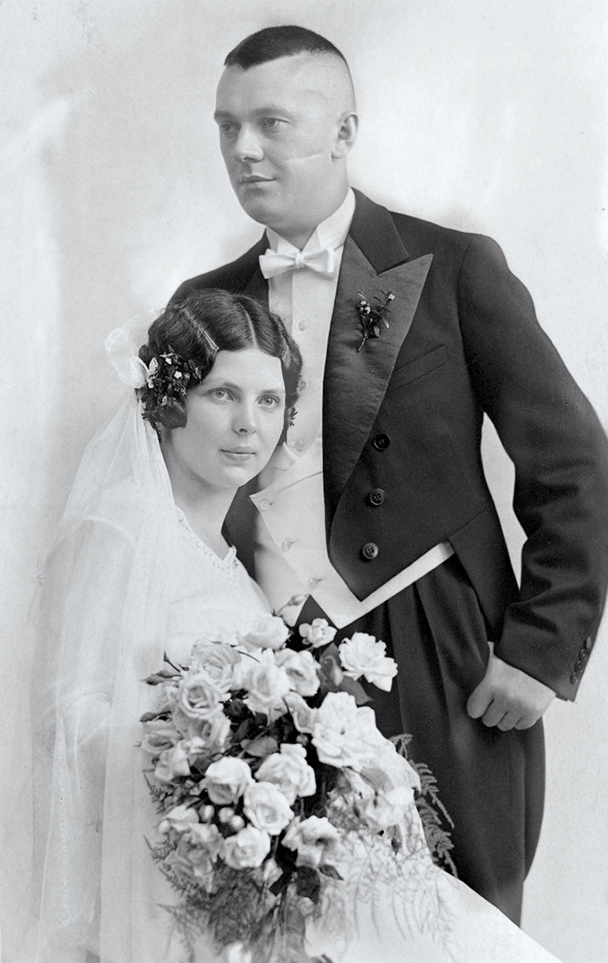 Am 9. Juli 1931 heiraten Anna Lemminger und Dr. Franz Burda.